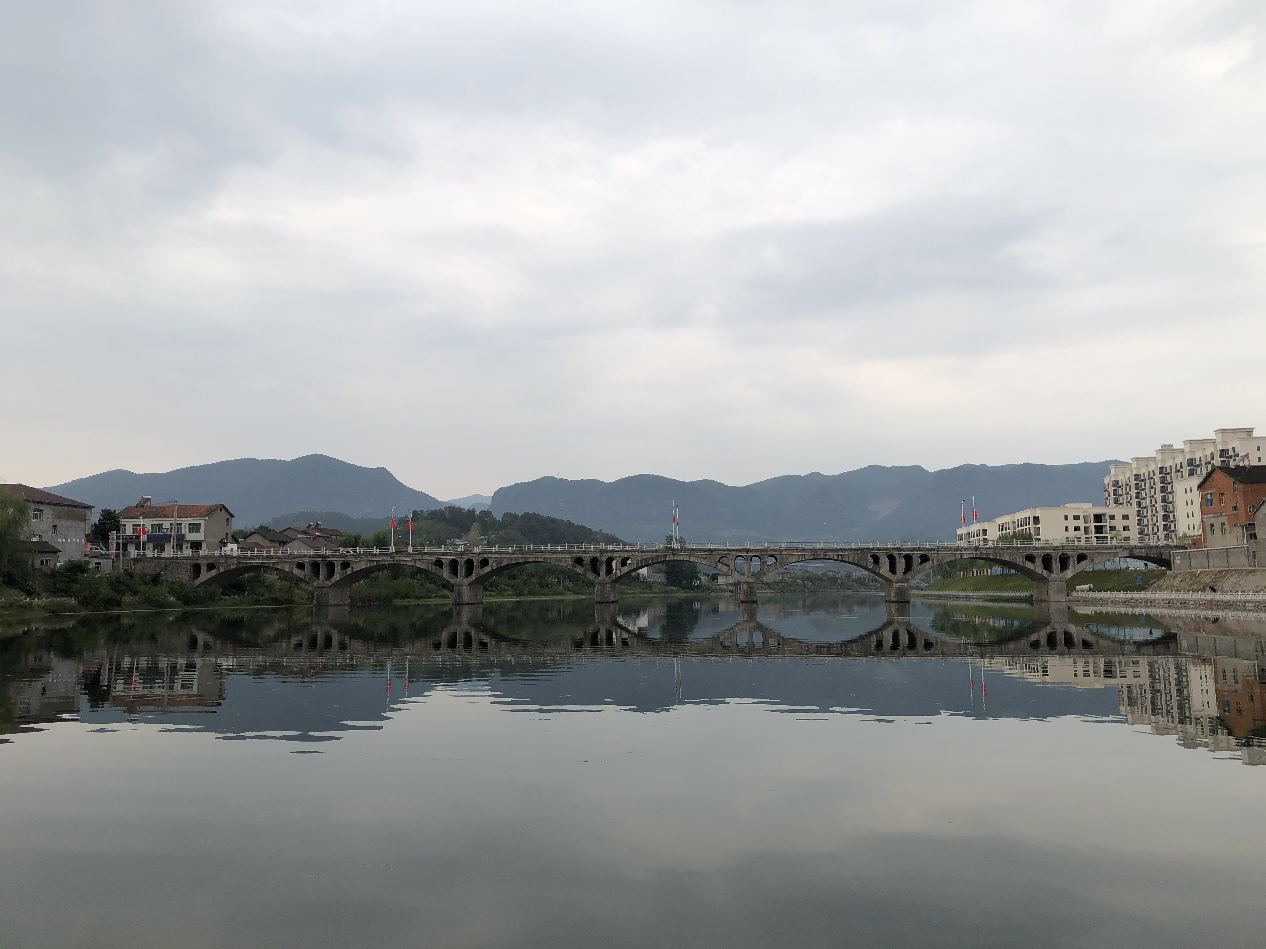 中文（中国大陆）: 位于湖北省宜昌市远安县的回龙湾景区